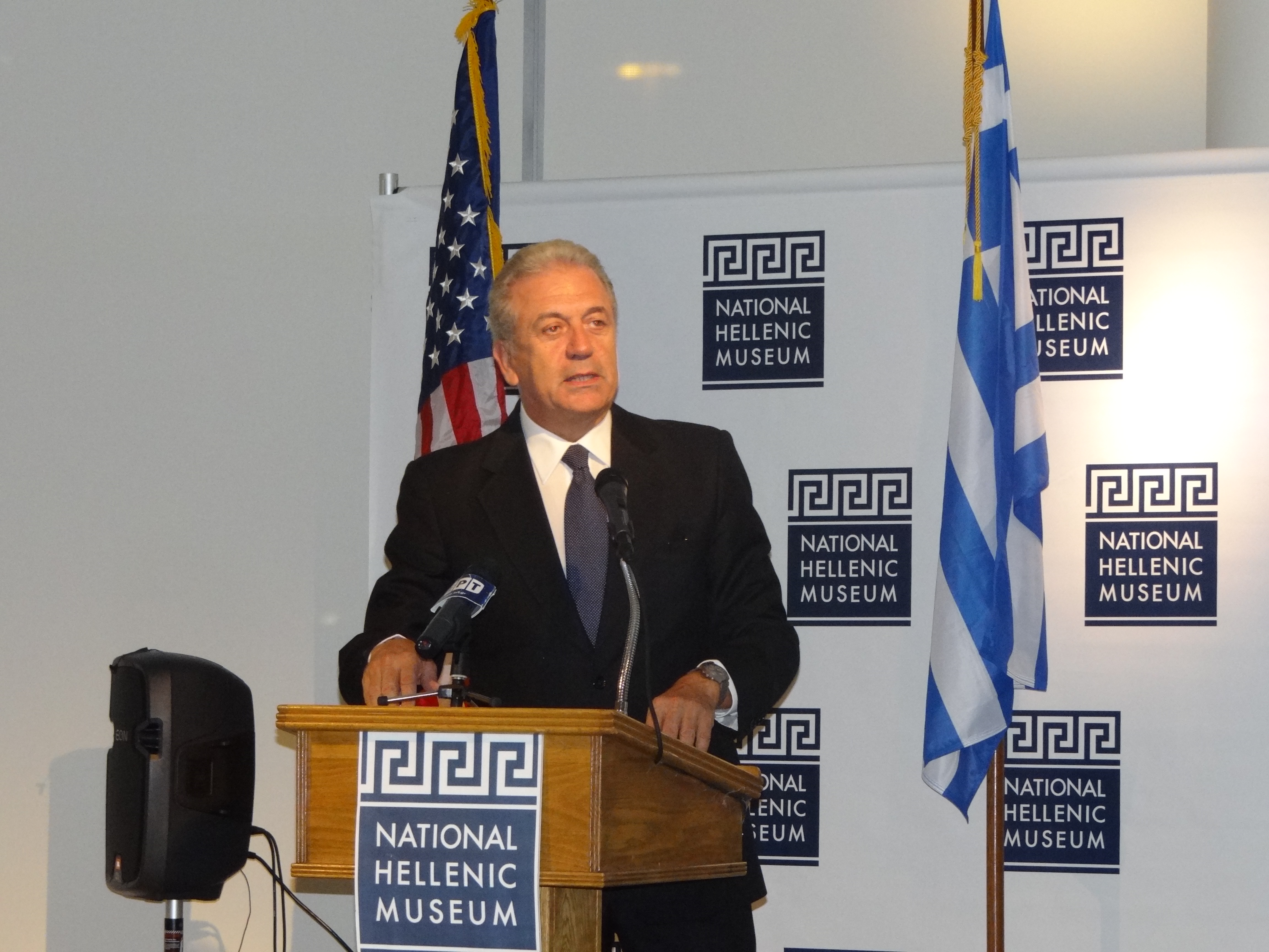 Από τις 19 έως τις 28 Σεπτεμβρίου 2012, ο Υπουργός Εξωτερικών Δημήτρης Αβραμόπουλος θα βρίσκεται στις ΗΠΑ προκειμένου να συμμετάσχει στις εργασίες της 67ης Γενικής Συνέλευσης των Ηνωμένων Εθνών και να πραγματοποιήσει σειρά επαφών στο Σικάγο (19-20), τη Βοστώνη (20-22) και τη Νέα Υόρκη (23-28). Στις 19 – 20 Σεπτεμβρίου, ο κ. Αβραμόπουλος θα βρίσκεται στο Σικάγο όπου θα παραβρεθεί σε συνάντηση στο Εθνικό Ελληνικό Μουσείο με συμμετοχή μελών της Ομογένειας, Αμερικανών αξιωματούχων και παραγόντων του επιχειρηματικού κόσμου. Επιπλέον, ο κ. Υπουργός θα συμμετάσχει στην 68η Ετήσια Συνάντηση της AJC/Chicago όπου θα απευθύνει χαιρετισμό, καθώς και σε πρωινό εργασίας παρατιθέμενο από το National Strategy Forum. Στο Σικάγο, ο κ. Υπουργός θα συναντηθεί, επίσης, με τον Σεβασμιώτατο Μητροπολίτη Σικάγου κ. Ιάκωβο καθώς και με τον Κυβερνήτη της Πολιτείας του Illinois, κ. Pat Quinn.